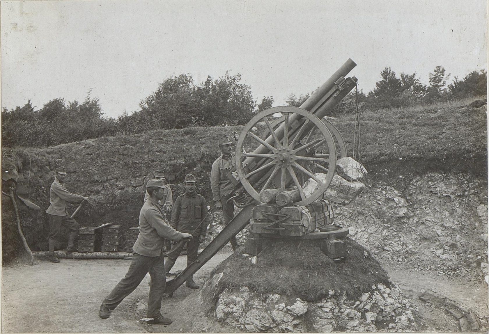 Fliegerabwehrgeschütz